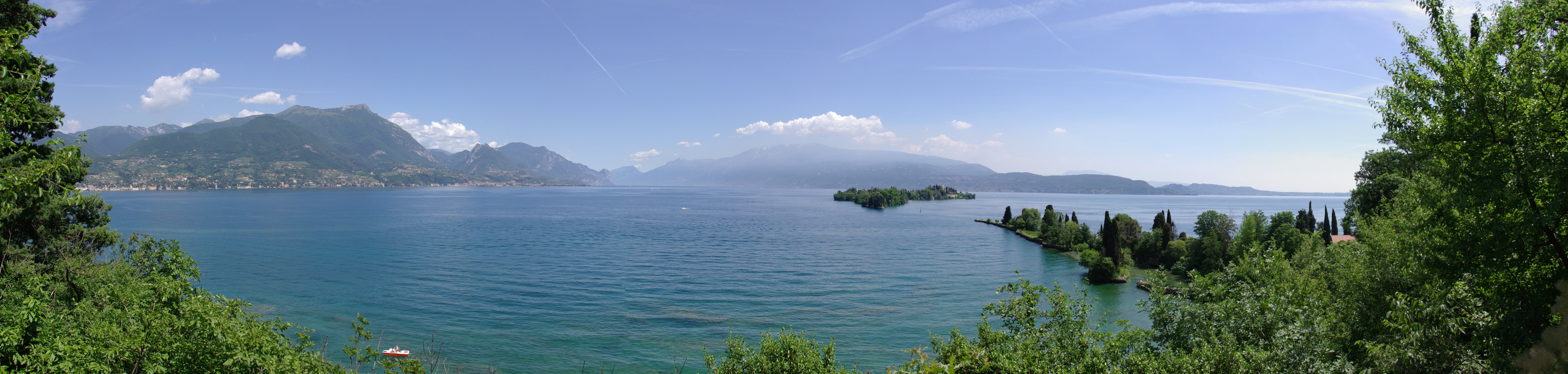 Gardasee, Panoramablick vom Cap San Fermo mit der Isola del Garda Richtung Monte Baldo